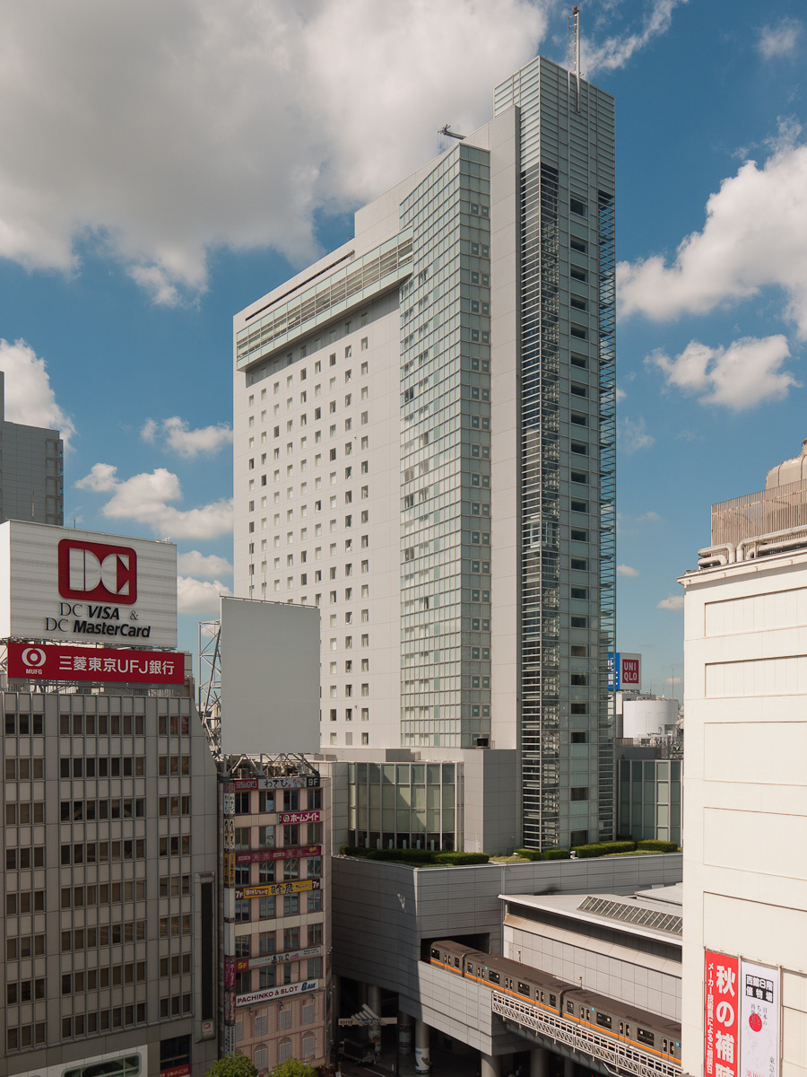 渋谷マークシティ・イースト（エクセル東急ホテル）、東京都渋谷区道玄坂2丁目。